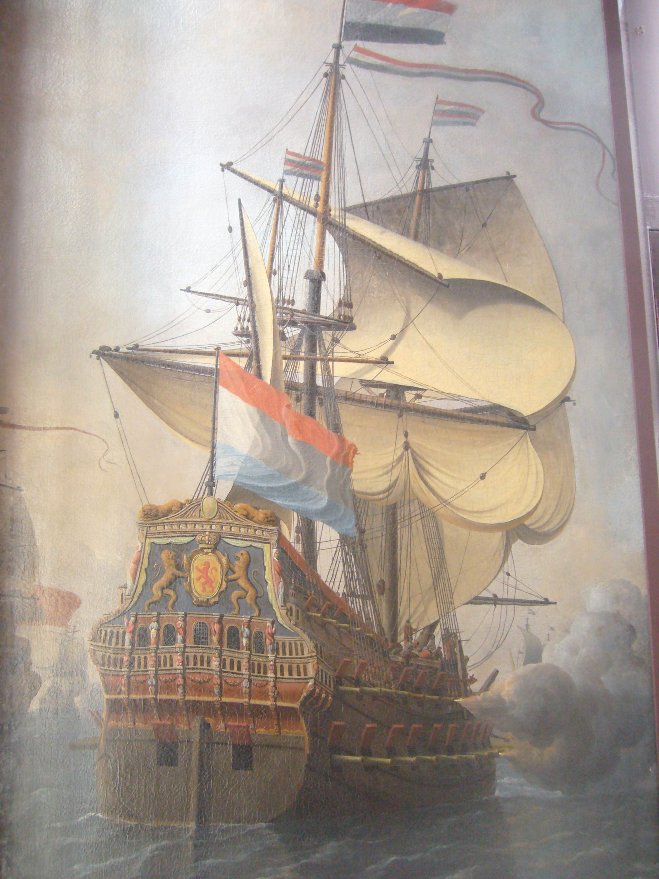 Hollandia, schip van Cornelis Tromp. Schildering in de koepelzaal van Trompenburg